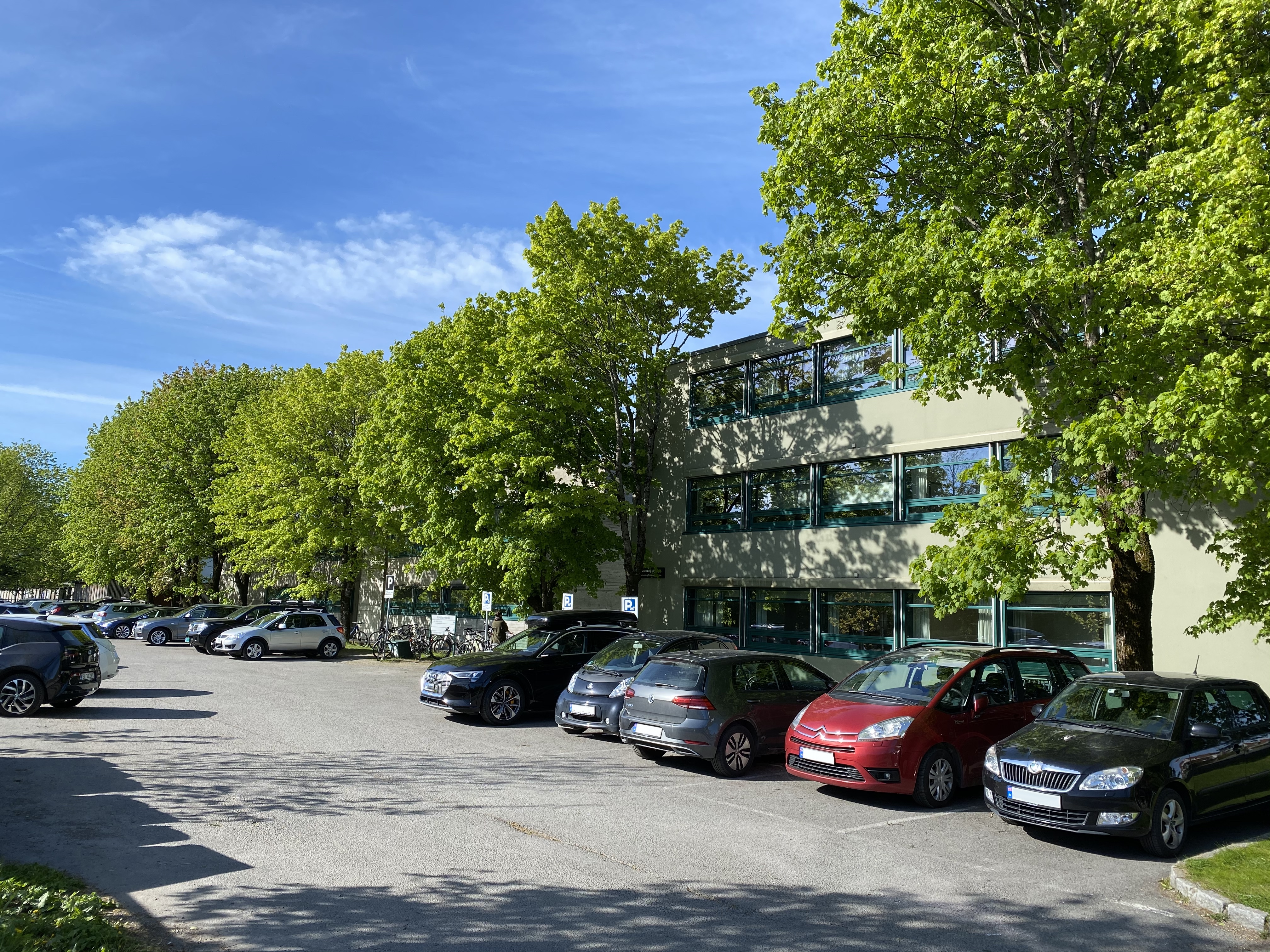 Bilde av Nic Waals Institutt tatt i mai 2020.